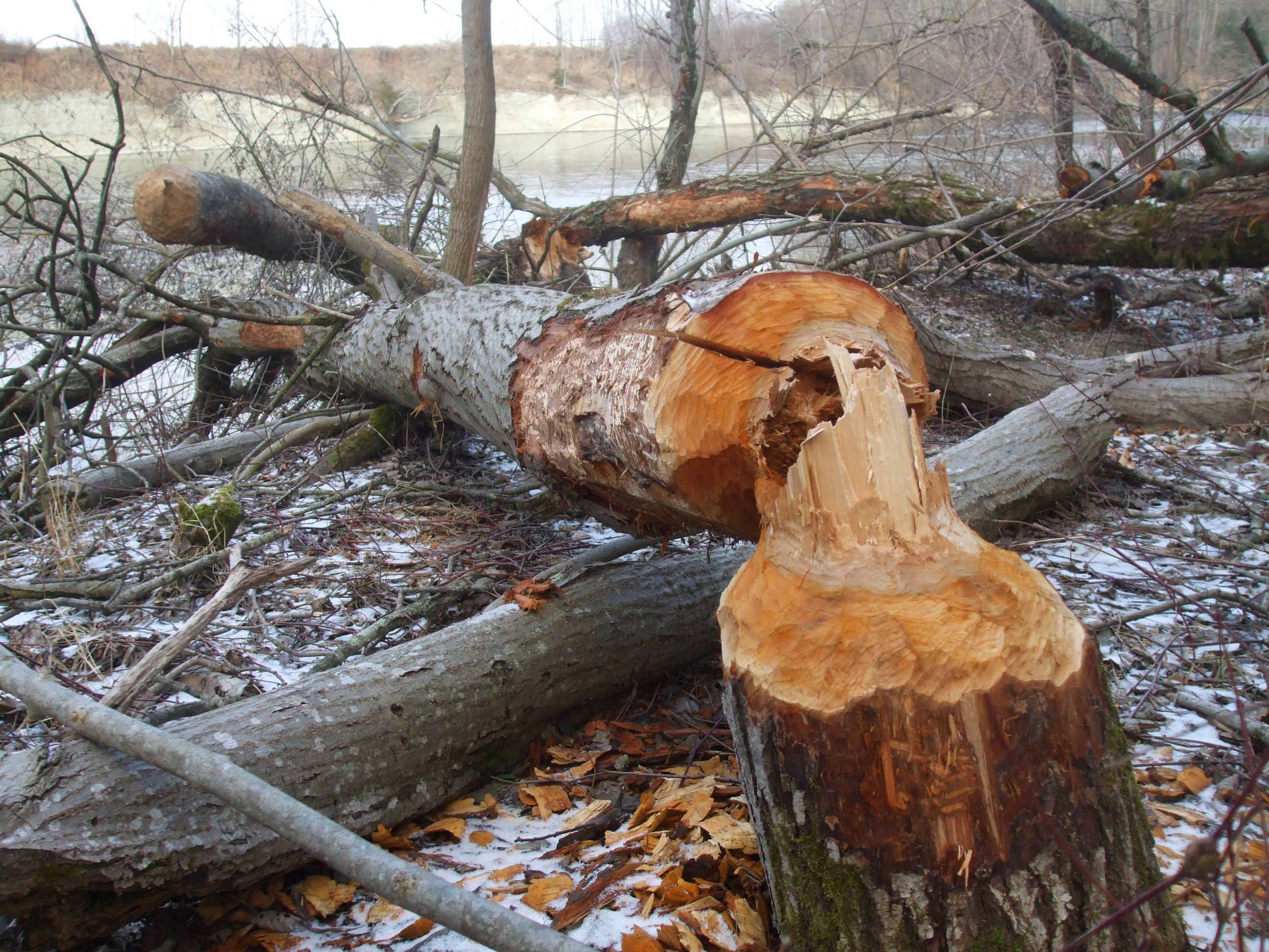 Biberbiss am Lech bei Sandau zwischen Landsberg und Kaufering.